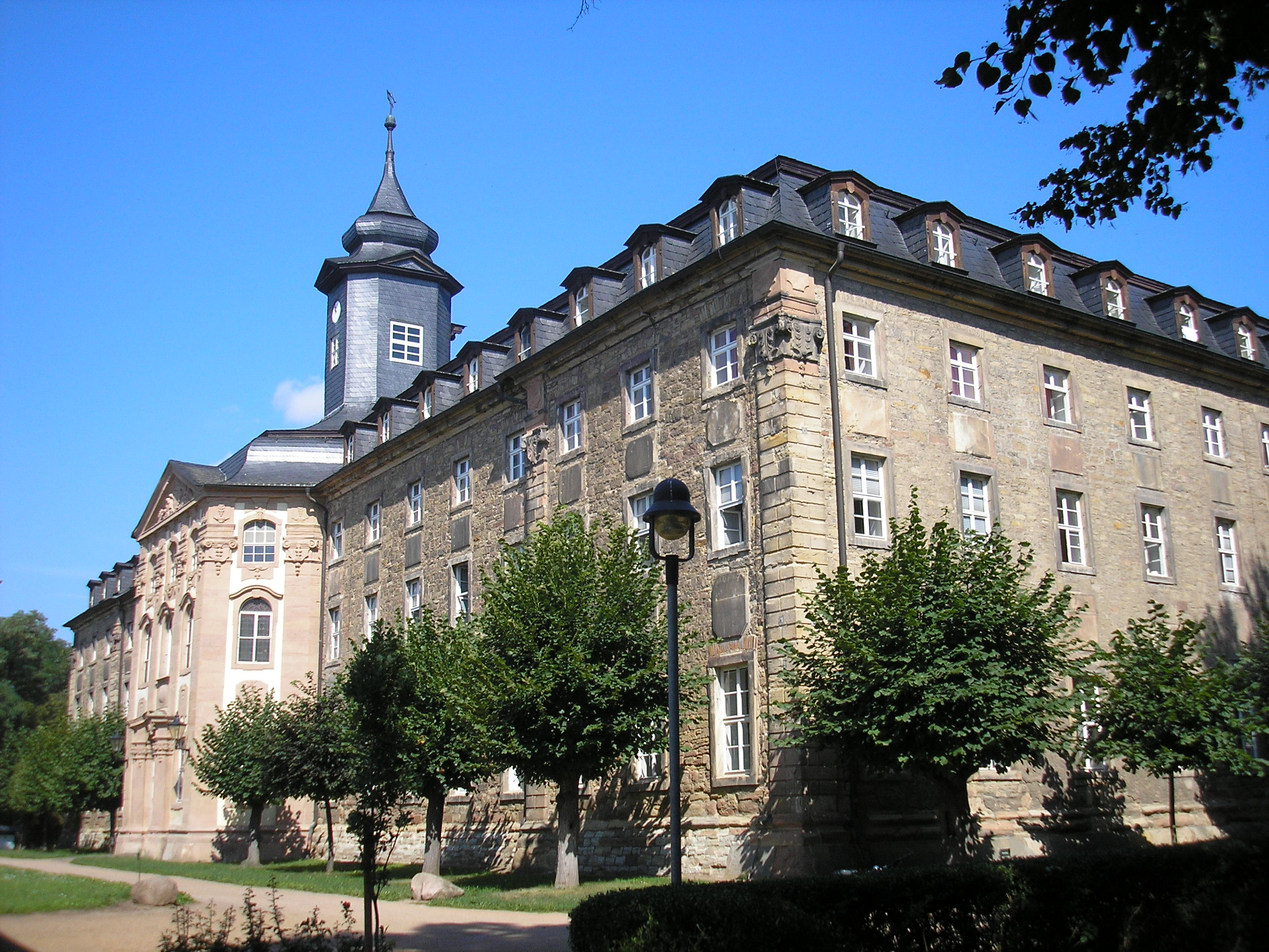 Die Klosterschule in Roßleben (Thüringen).